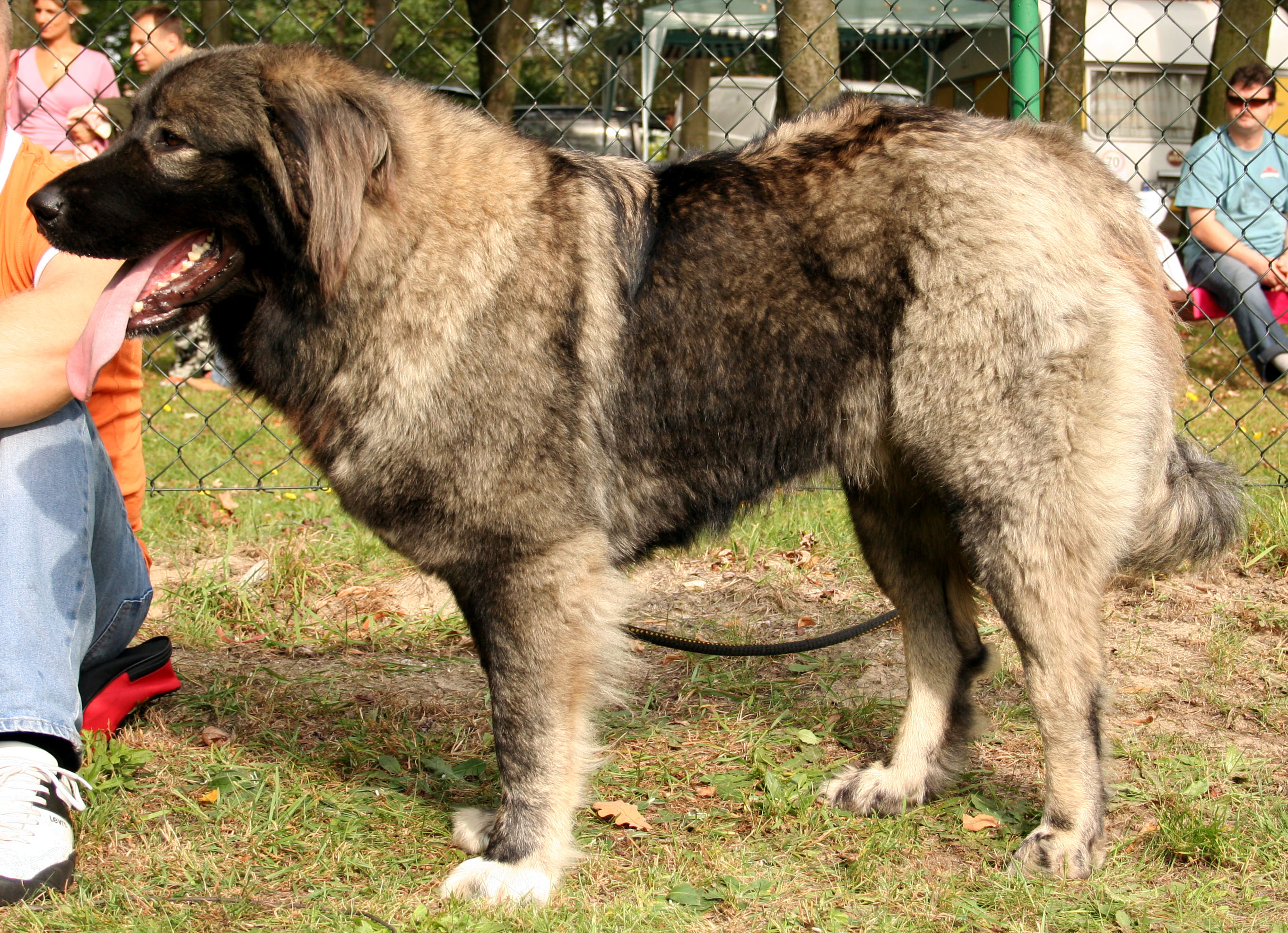 Owczarek kaukaski na krajowej wystawie w Rybniku - Kamieniu